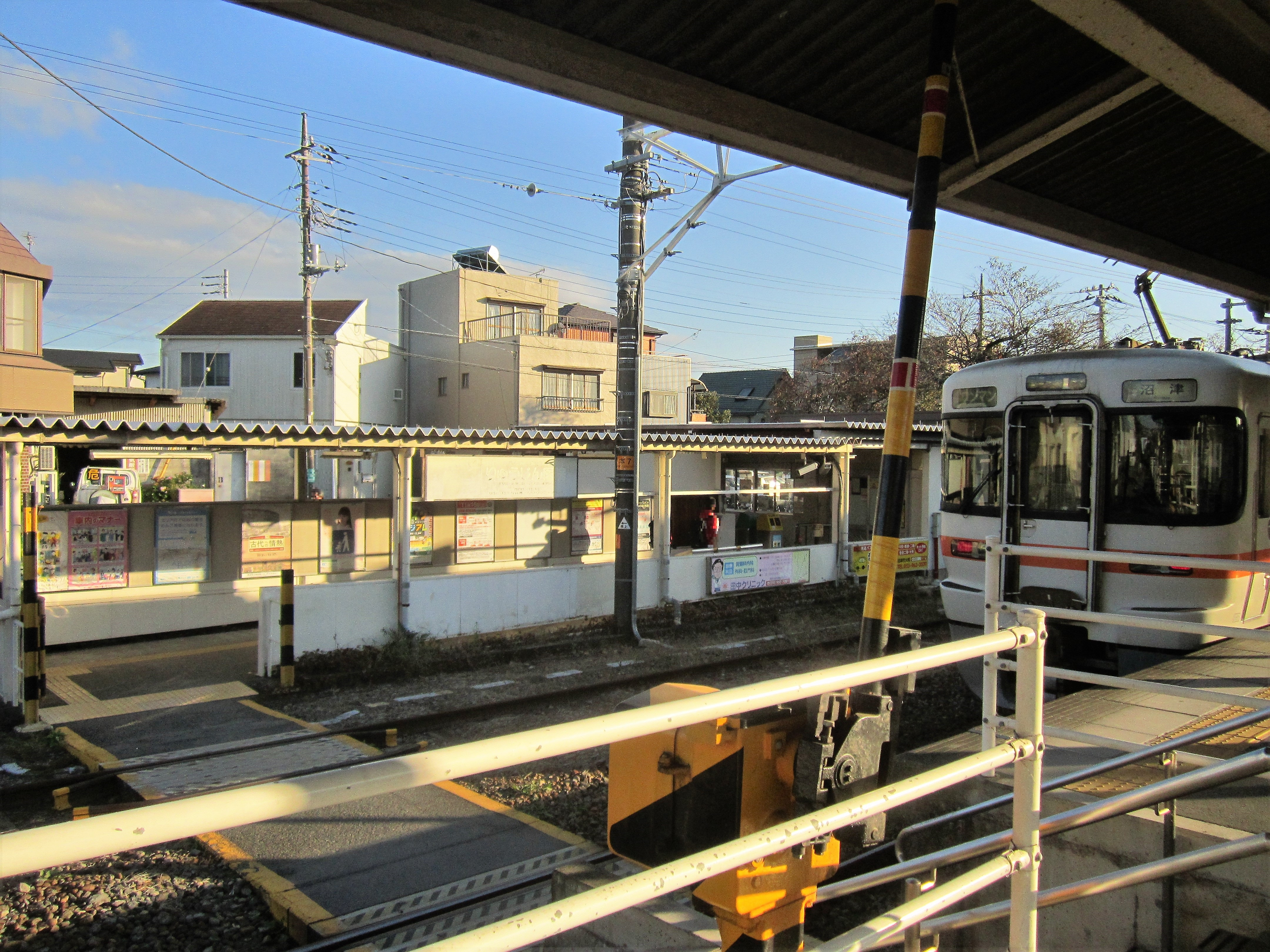 裾野駅東口